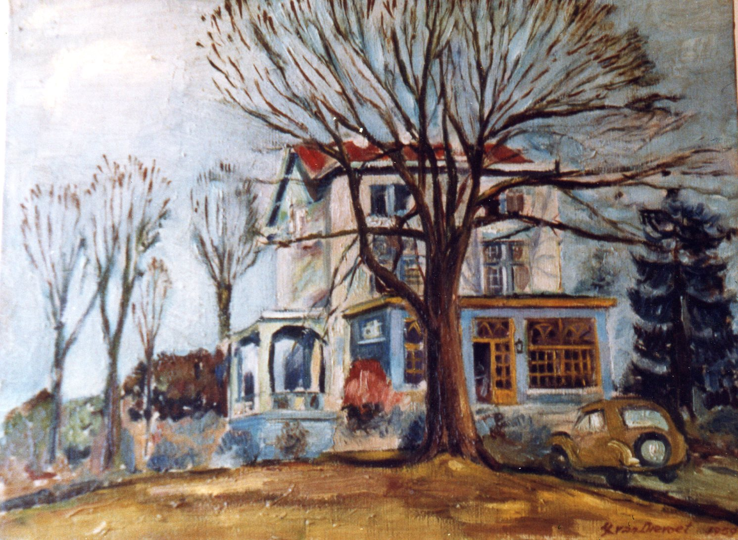 Linkebeek (Belgique), villa "Les Roches" du peintre Jules LISMONDE